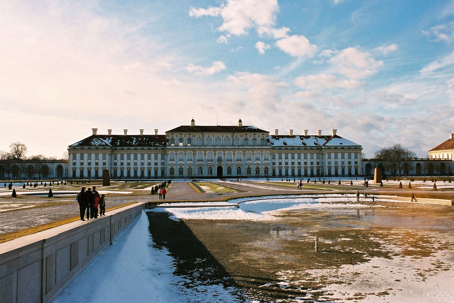 Schleissheim Palace in Oberschleißheim, Germany East facade seen from the park